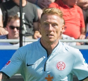 Niki Zimling am 2. Spieltag der Saison 2013/14 (17. August 2013).